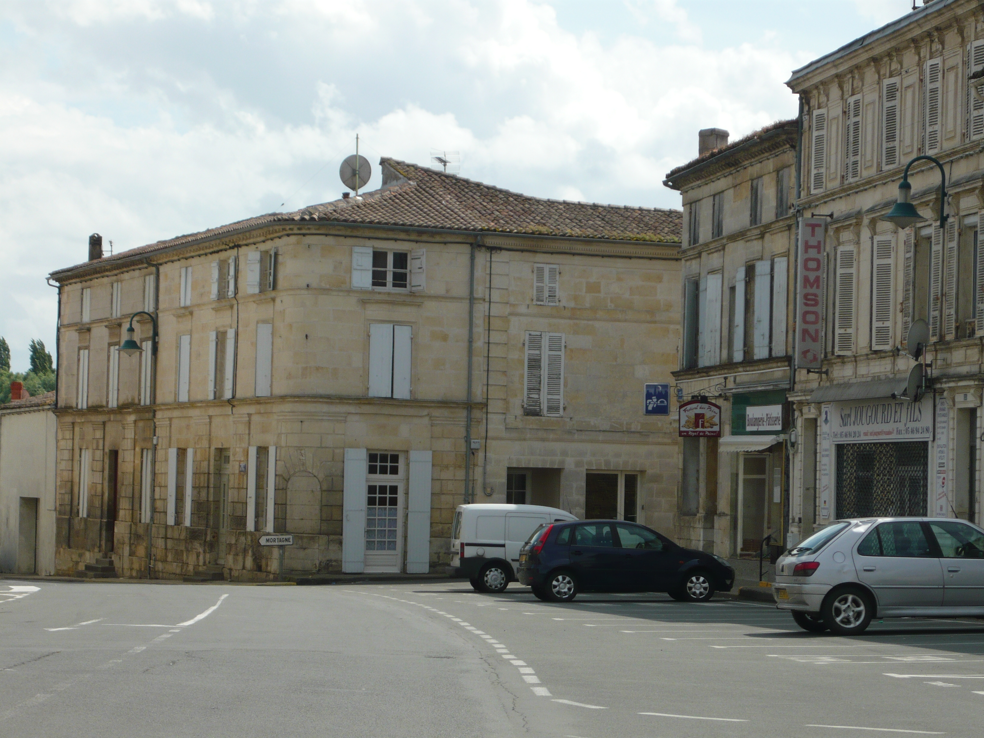 Place centrale de Gémozac face à l'église (17).